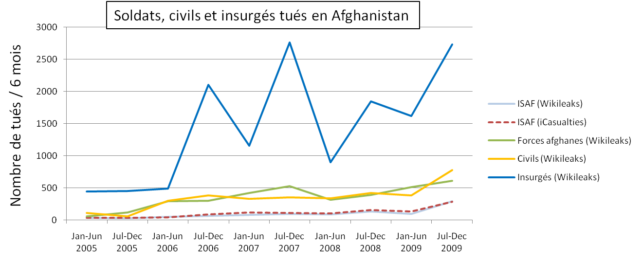 Statistiques des pertes humaines entre 2005 et 2009 durant la guerre d'Afghanistan selon les rapports de l'ISAF et les chiffres révélés par les documents mit en ligne par Wikileaks.